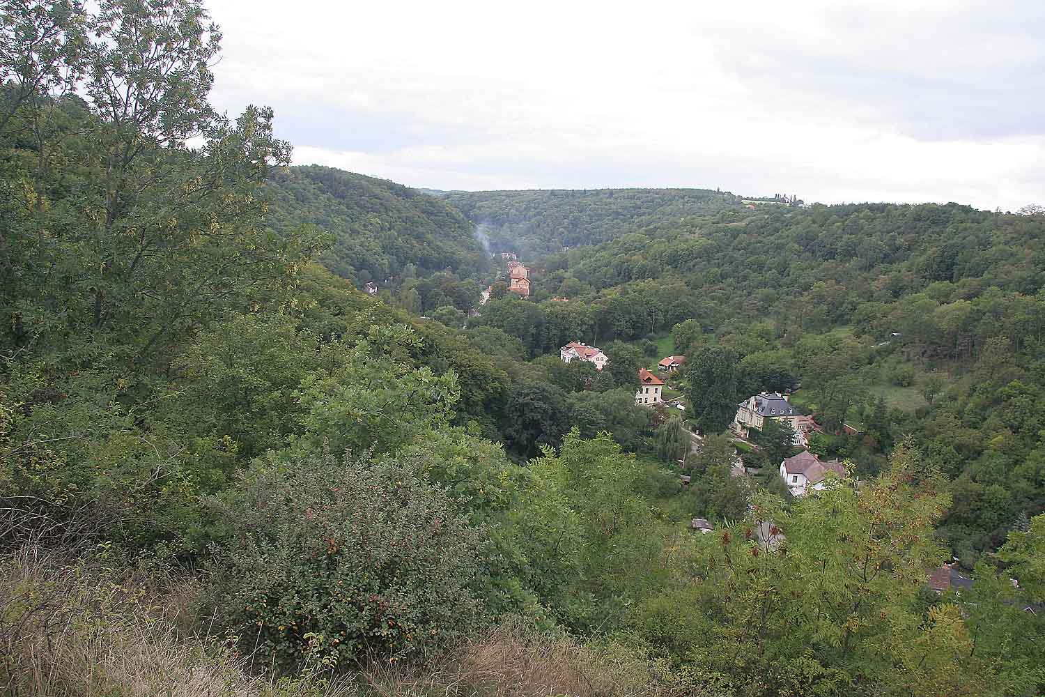 Přírodní památka Dolní Šárka v Praze - Dejvicích, Czech Republic autor:Prazak date:1. 9. 2006